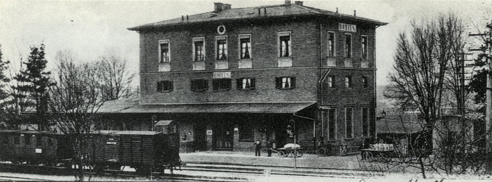 Empfangsgebäude des Bahnhofs Dorfen von der Gleisseite, links der 1901 erbaute Westflügel und die zwei letzten Wagen eines Zuges. Ausschnitt einer Ansichtskarte.